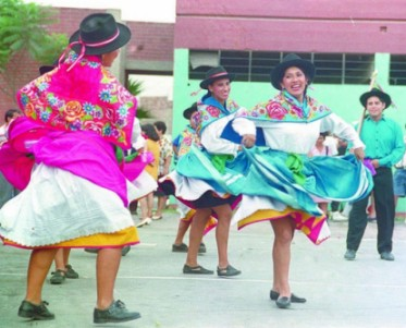 Baile Los Rejoneros